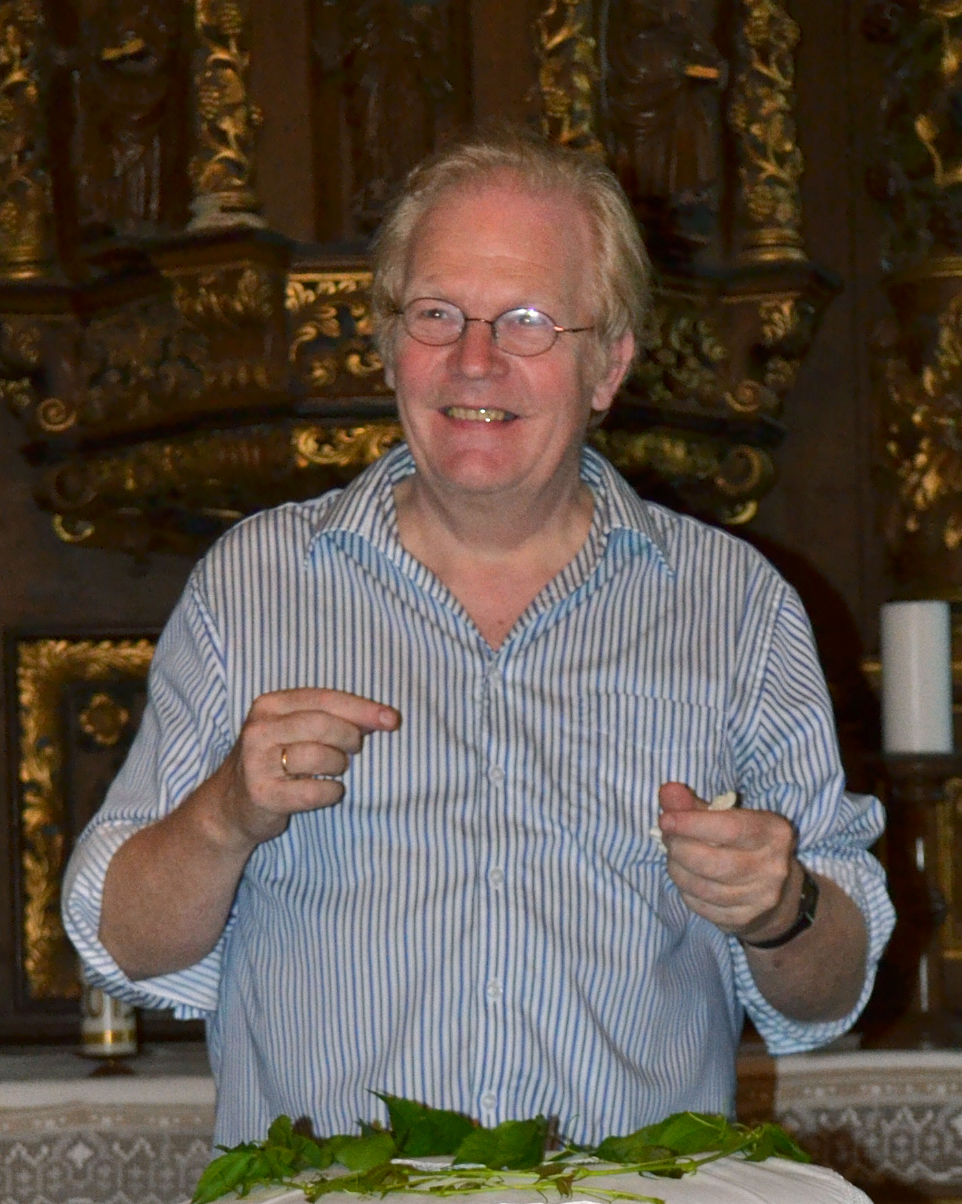 Quedlinburger Kantor Gottfried Biller in der Westerhäuser Kirche